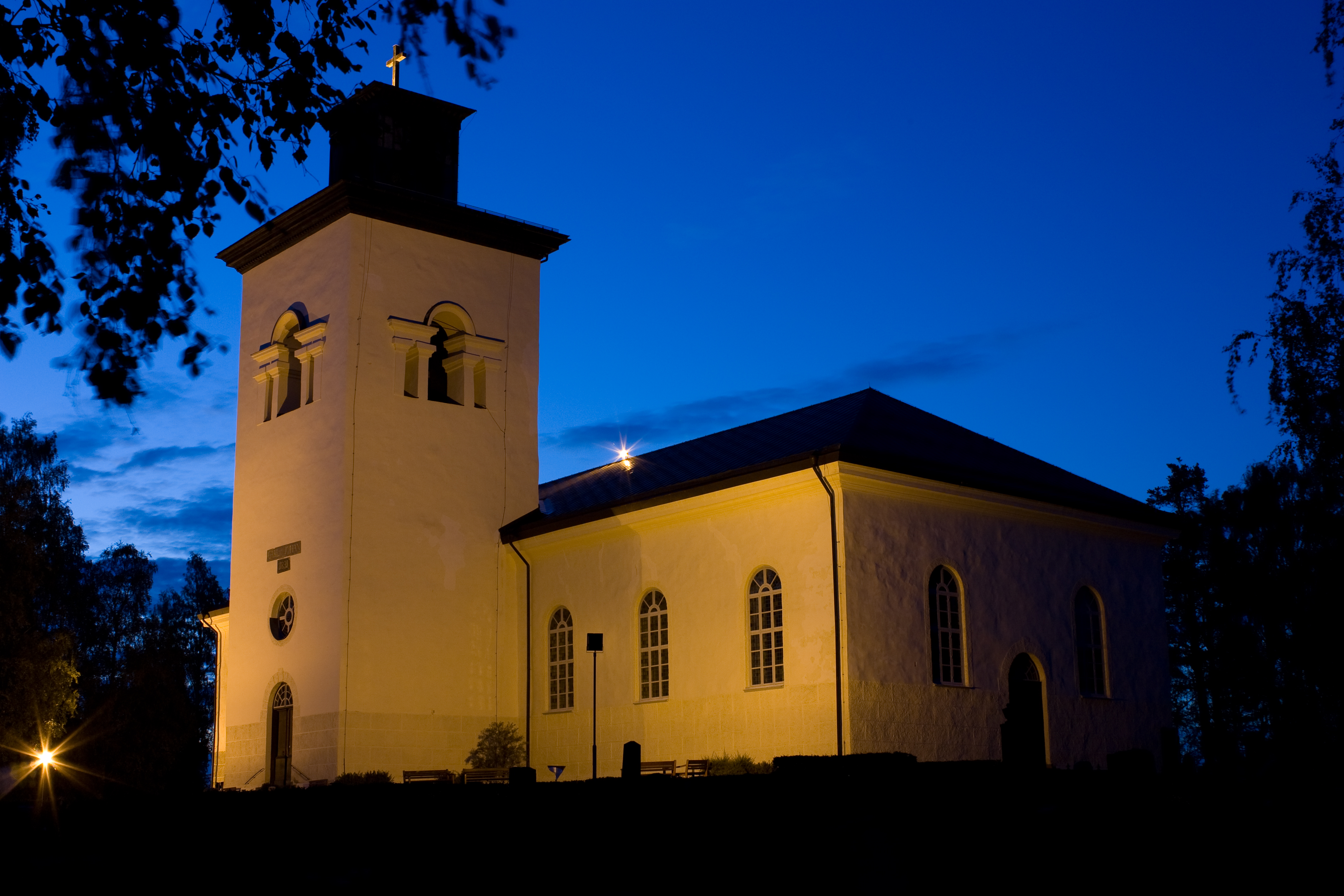 Bild av överluleå kyrka fotat en september kväll.